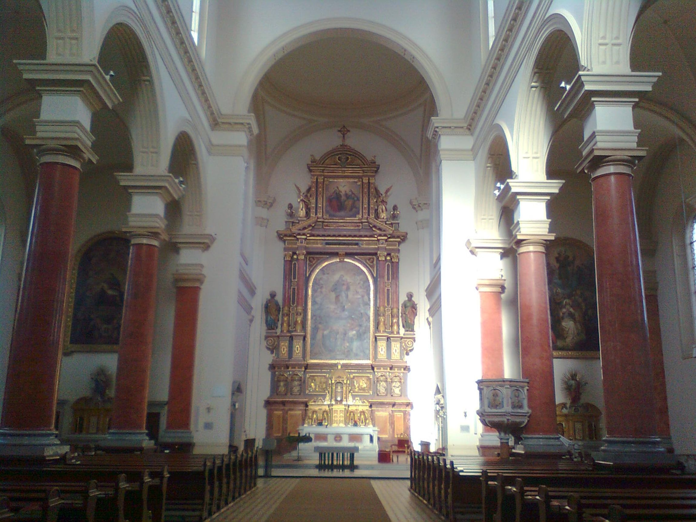 Innenraum der Josefskirche